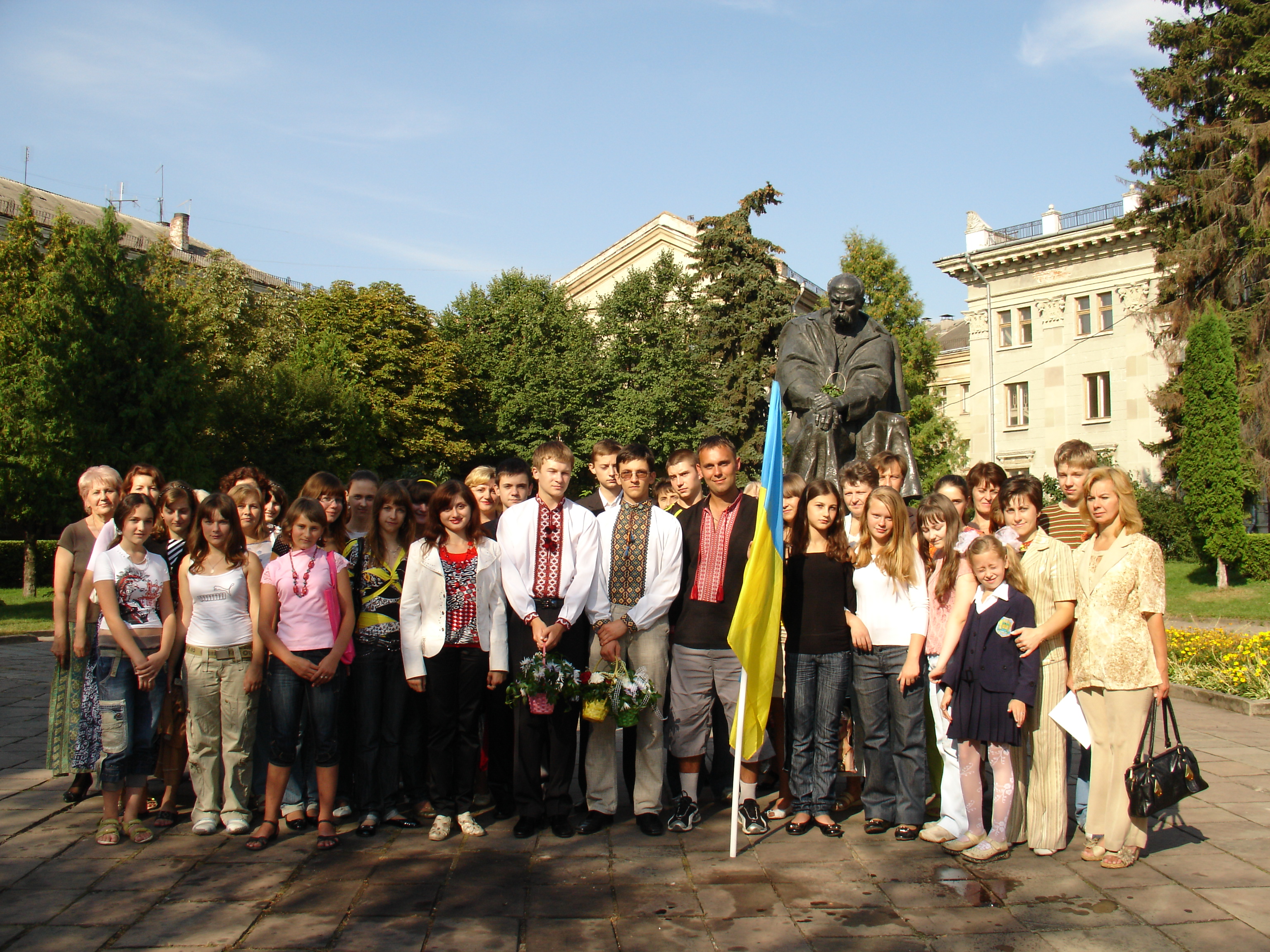 Тарасів дороговказ (2008) - Тернопіль